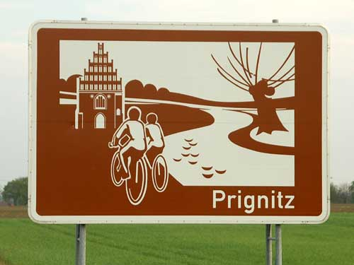 Touristisches Hinweisschild an der A19 mit dem Hinweis auf Prignitz